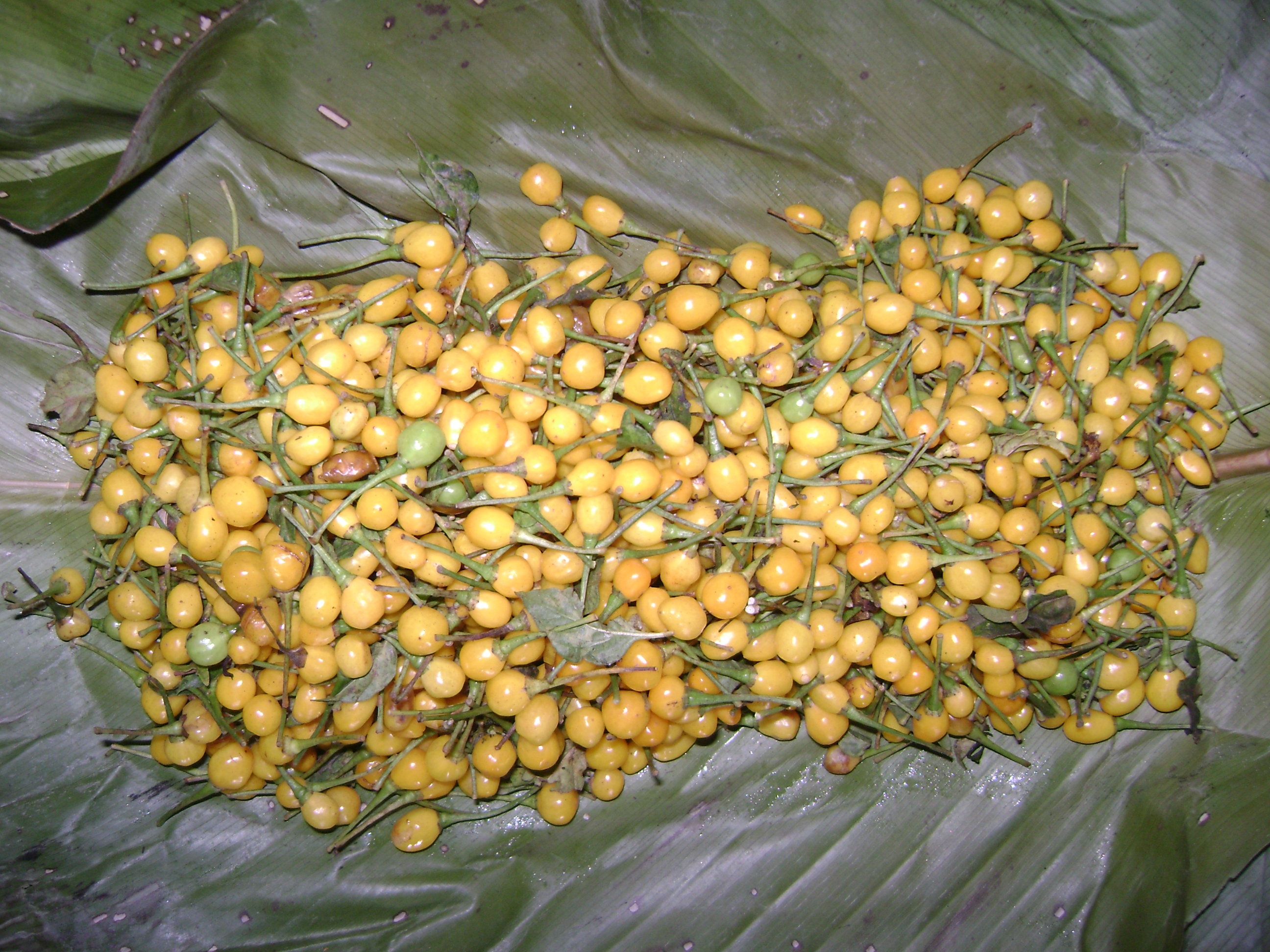 Ajíes charapita en su envoltorio de hojas de bijao.